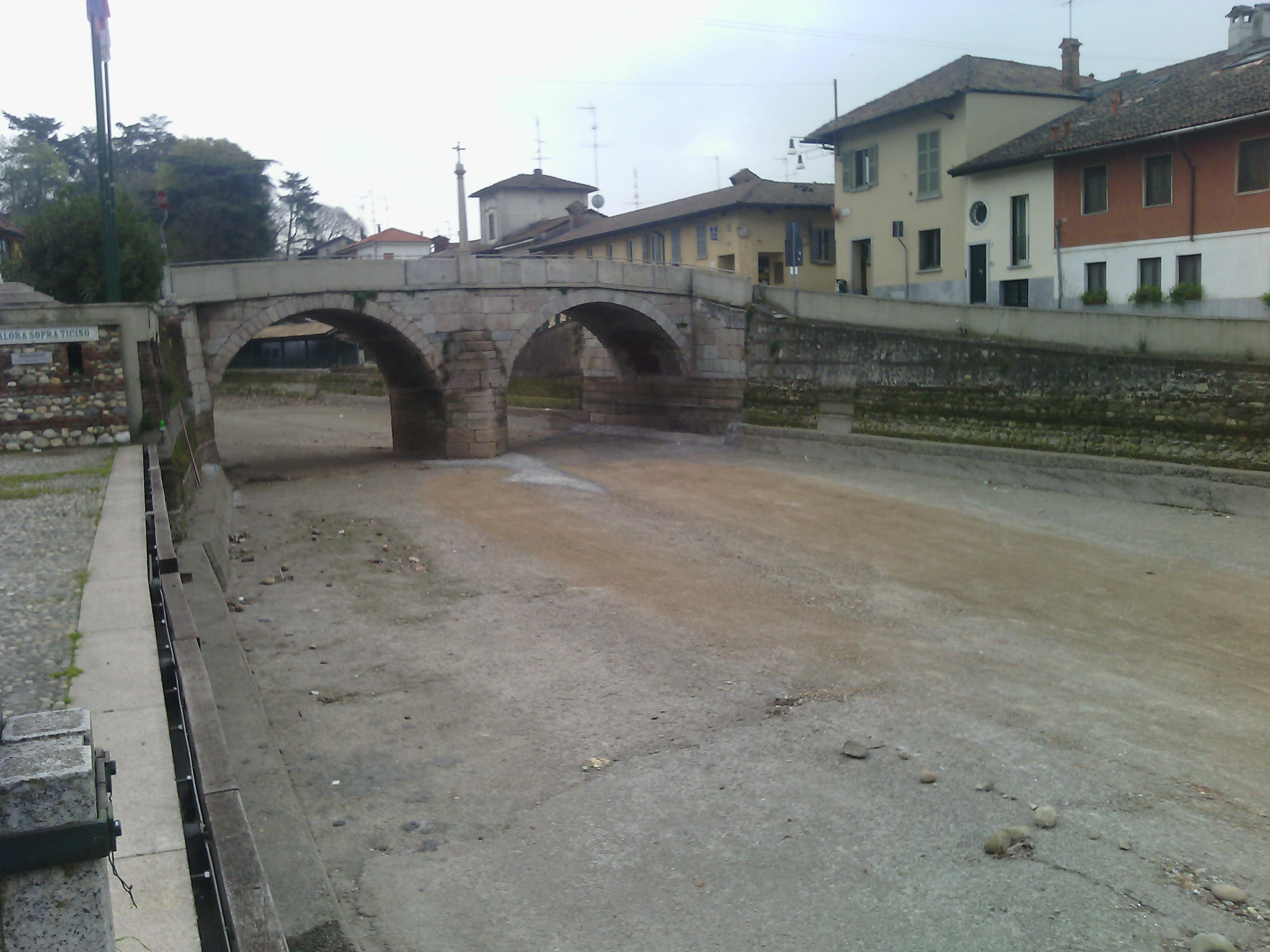 Asciutta del Naviglio Grande a Boffalora sopra Ticino (MI) - Italy